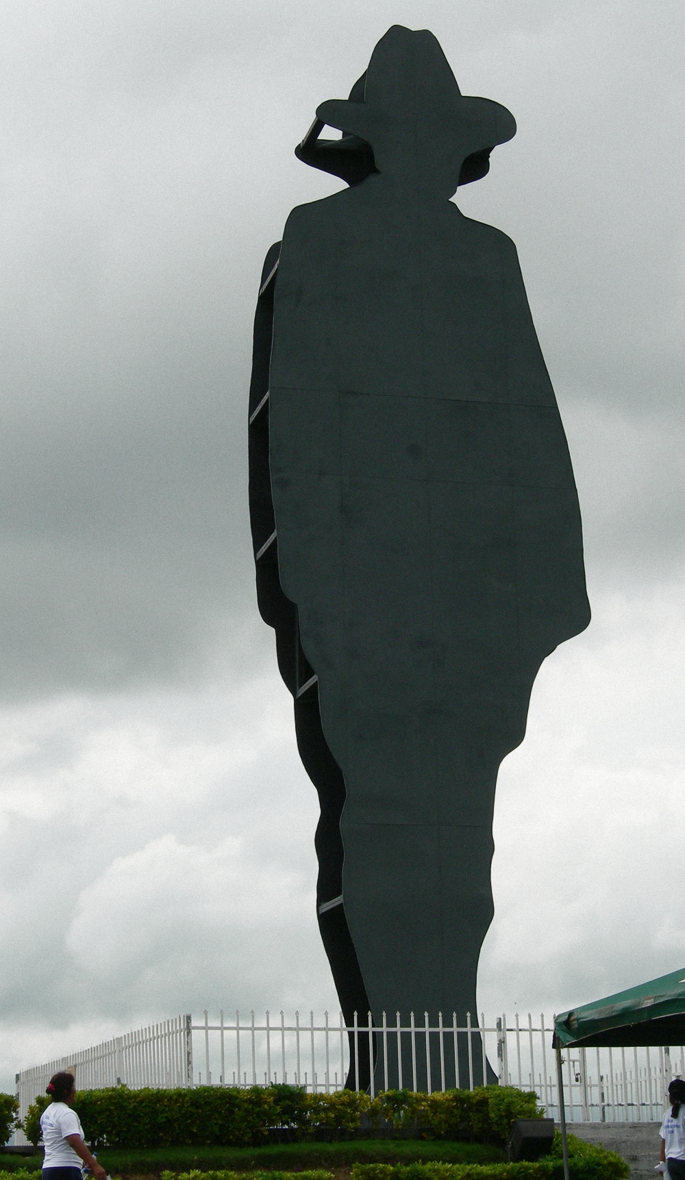 Sandino statue in Nicaragua.